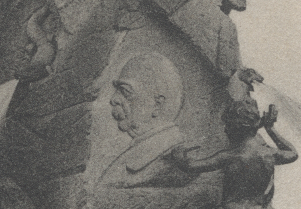 Foto Bismarckbrunnen von 1906 geerbt